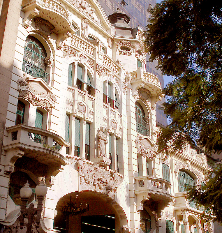 Fachada do antigo Cine Guarany e da Farmácia Carvalho, em Porto Alegre, Brasil. A decoração é obra da oficina de João Vicente Friedrichs